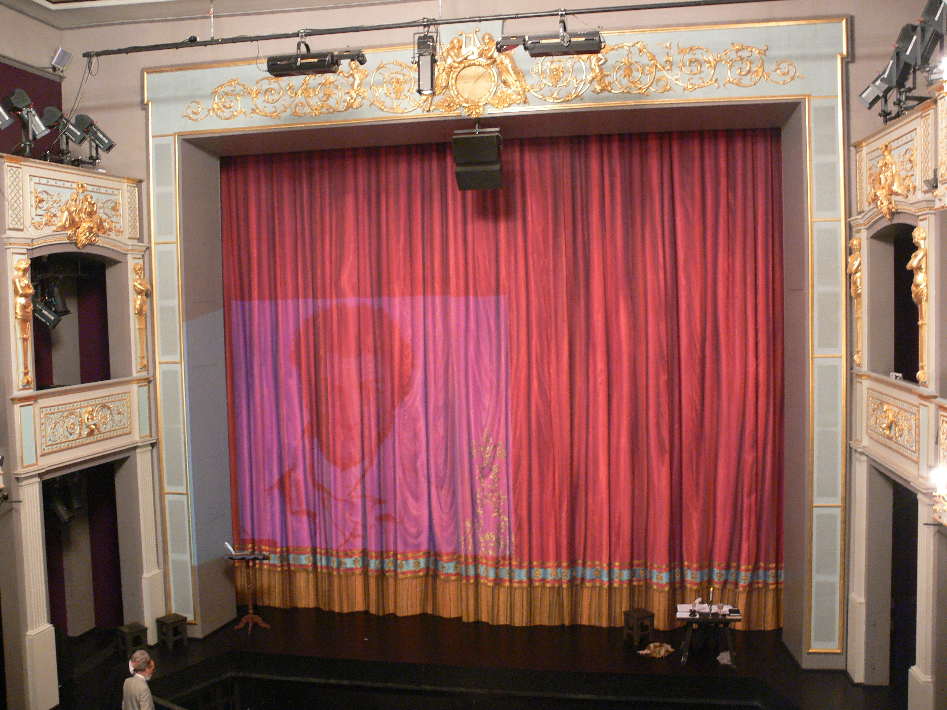 E.T.A.-Hoffmann-Theater Bamberg Blick zur Bühne